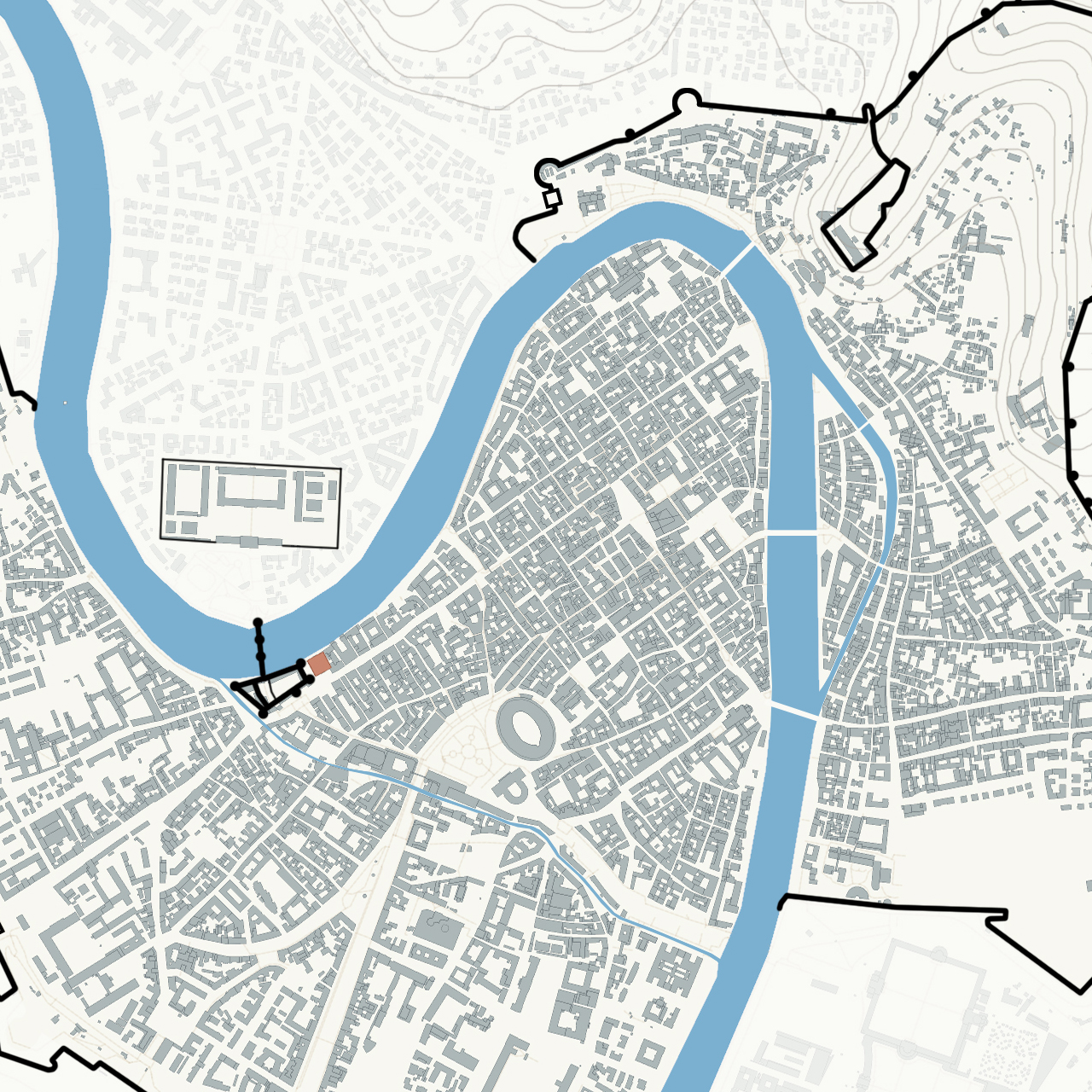 Planimetria della città di Verona con le mura e le porte urbiche principali, in rosso l'arco dei Gavi. Vedi anche Le mura di Verona di Annamaria Conforti Calcagni.